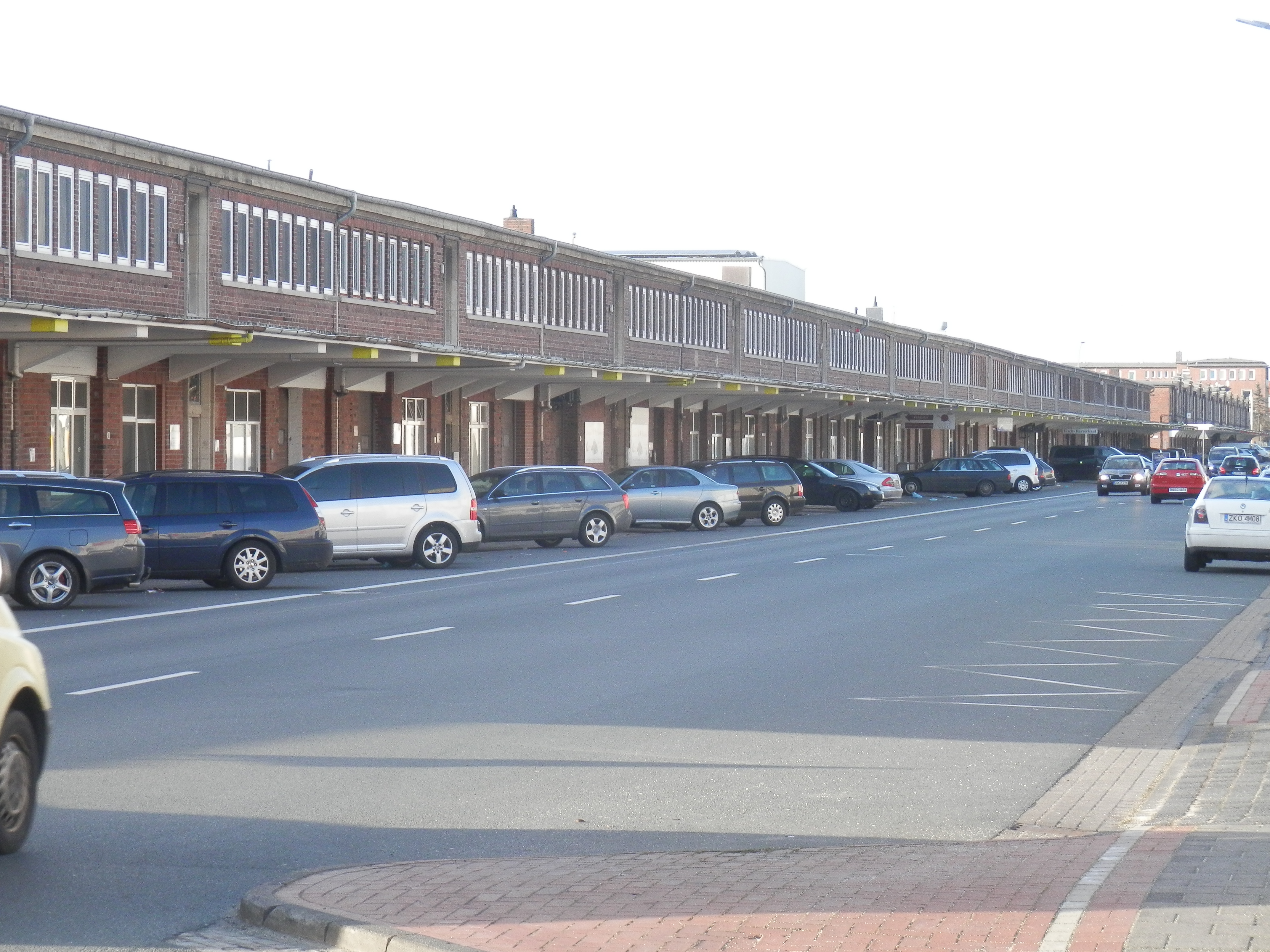 Packhalle XIV in Bremerhaven, Am Lunedeich Das abgebildete Objekt ist ein geschütztes Kulturdenkmal in der Freien Hansestadt Bremen, mit der Nr. 3006 beim Landesamt für Denkmalpflege registriert.